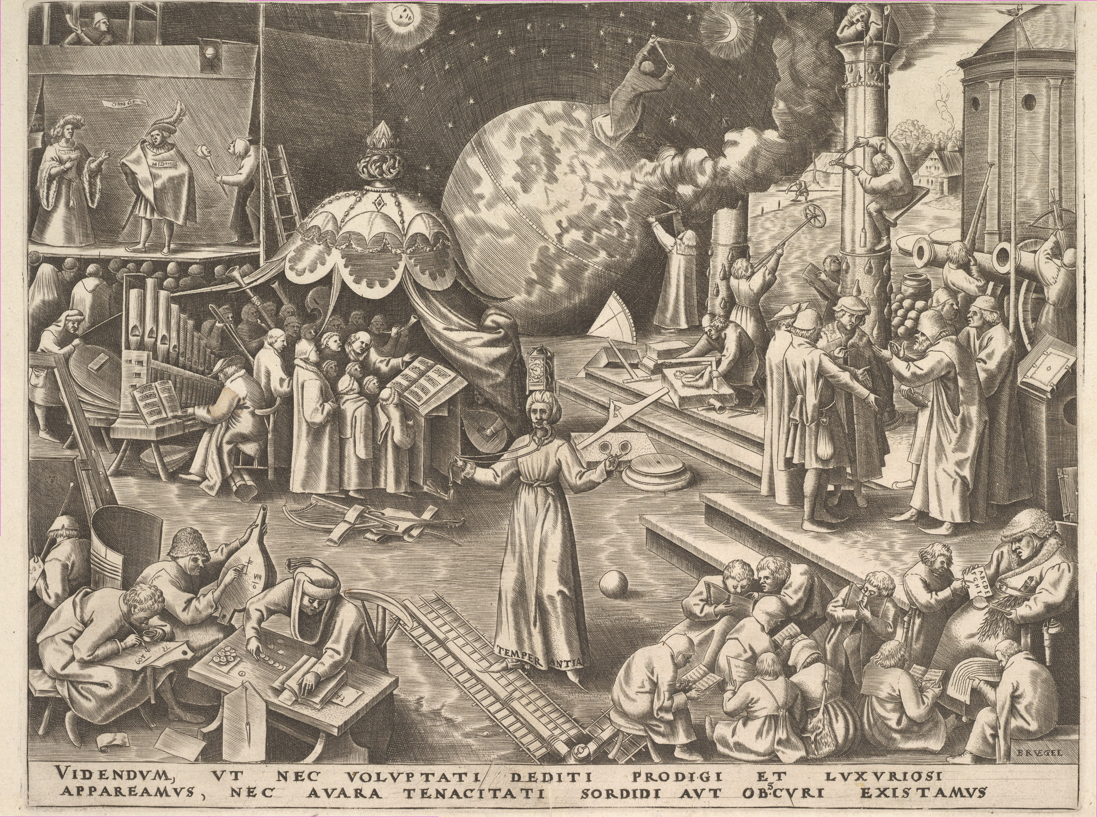 Die personifizierte Mäßigung, umgeben von Wissenschaften und Künsten. Mit der einen Hand zügelt sie sich selbst, mit der anderen hält sie Augengläser. Eine Uhr bekrönt sie.[1]